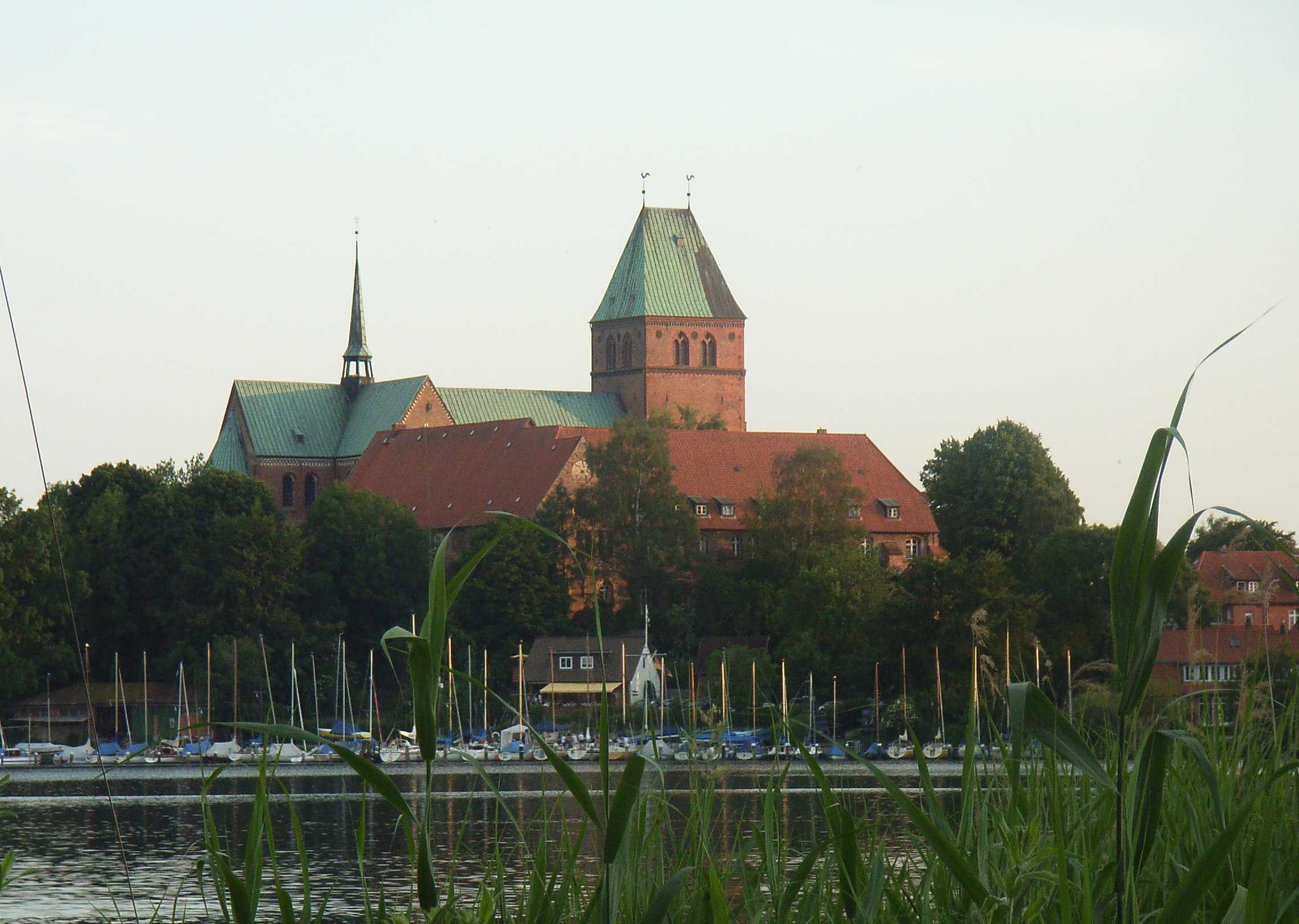 Ratzeburger Dom, Schleswig-Holstein, Deutschland